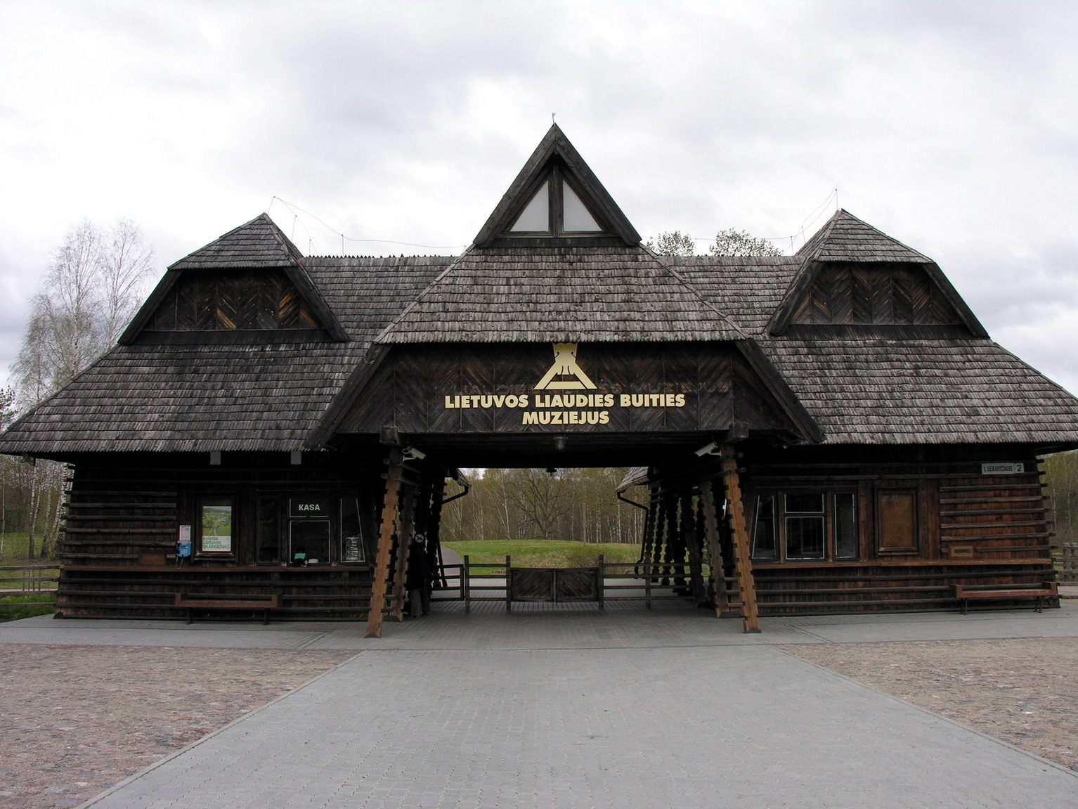 Rumšiškės, Lietuvos liaudies buities muziejus 2007 m. balandžio 21 d., Lietuva